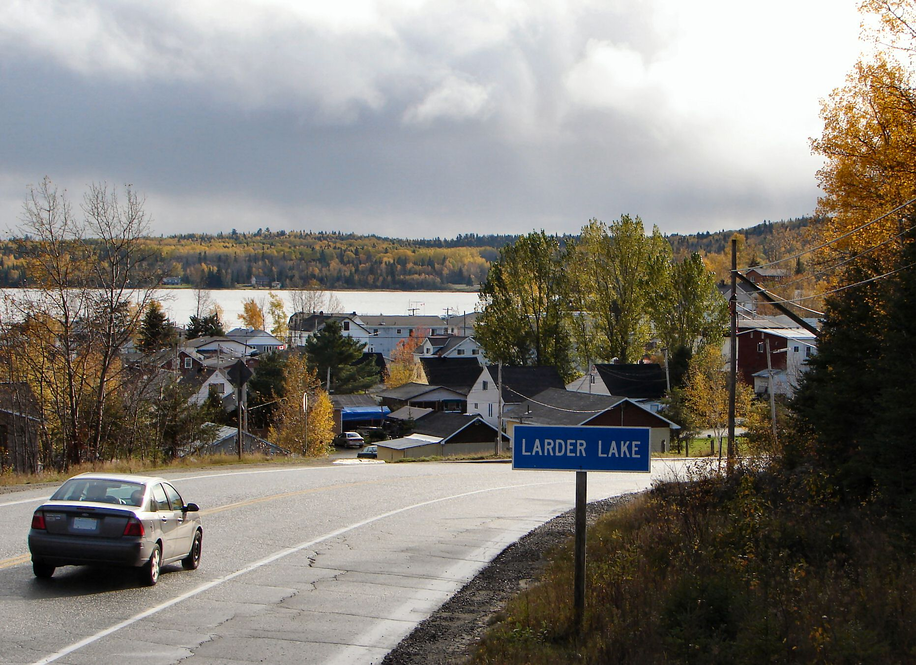 Larder Lake, Ontario, Canada